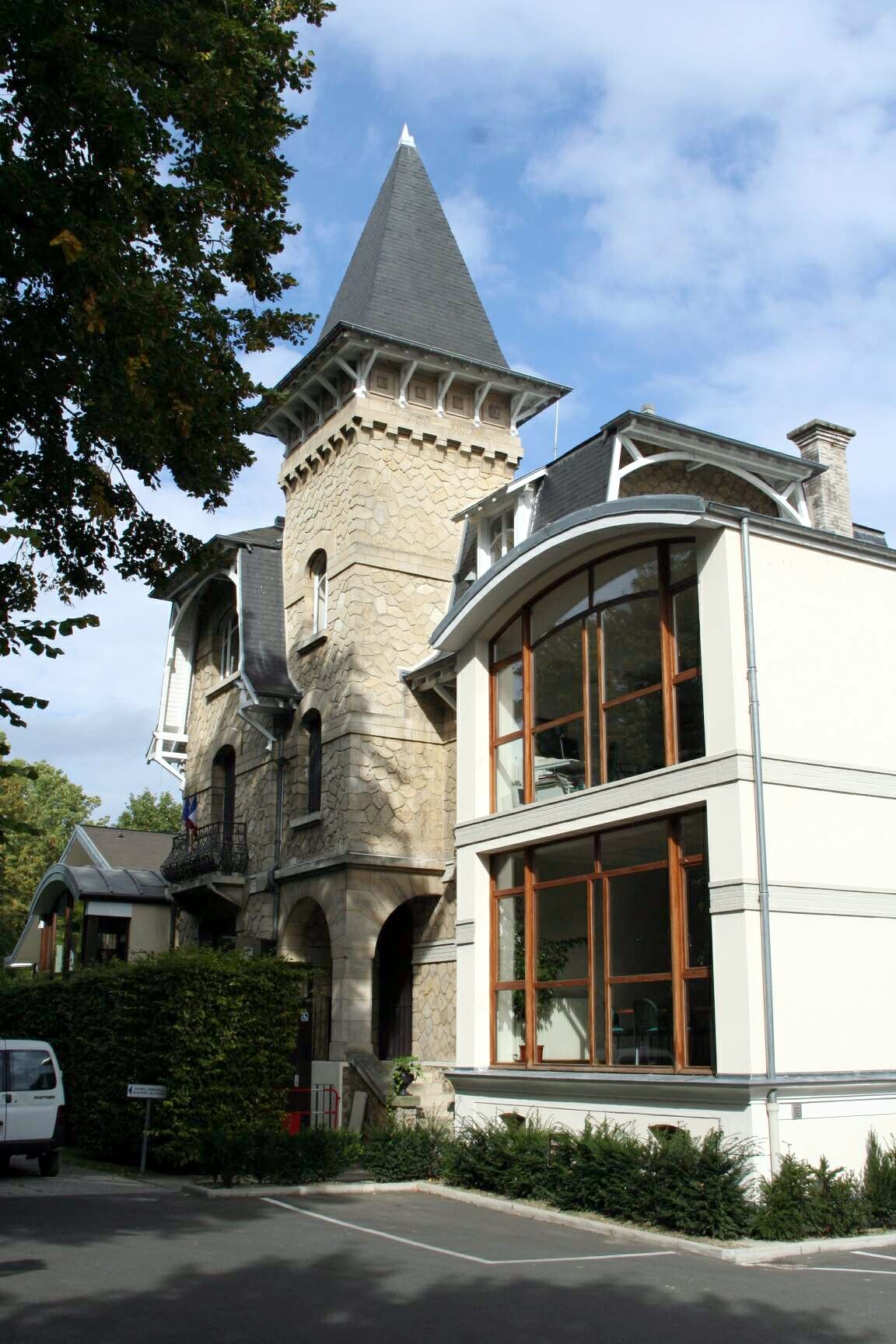 Mairie de Villennes-sur-Seine - Yvelines (France)